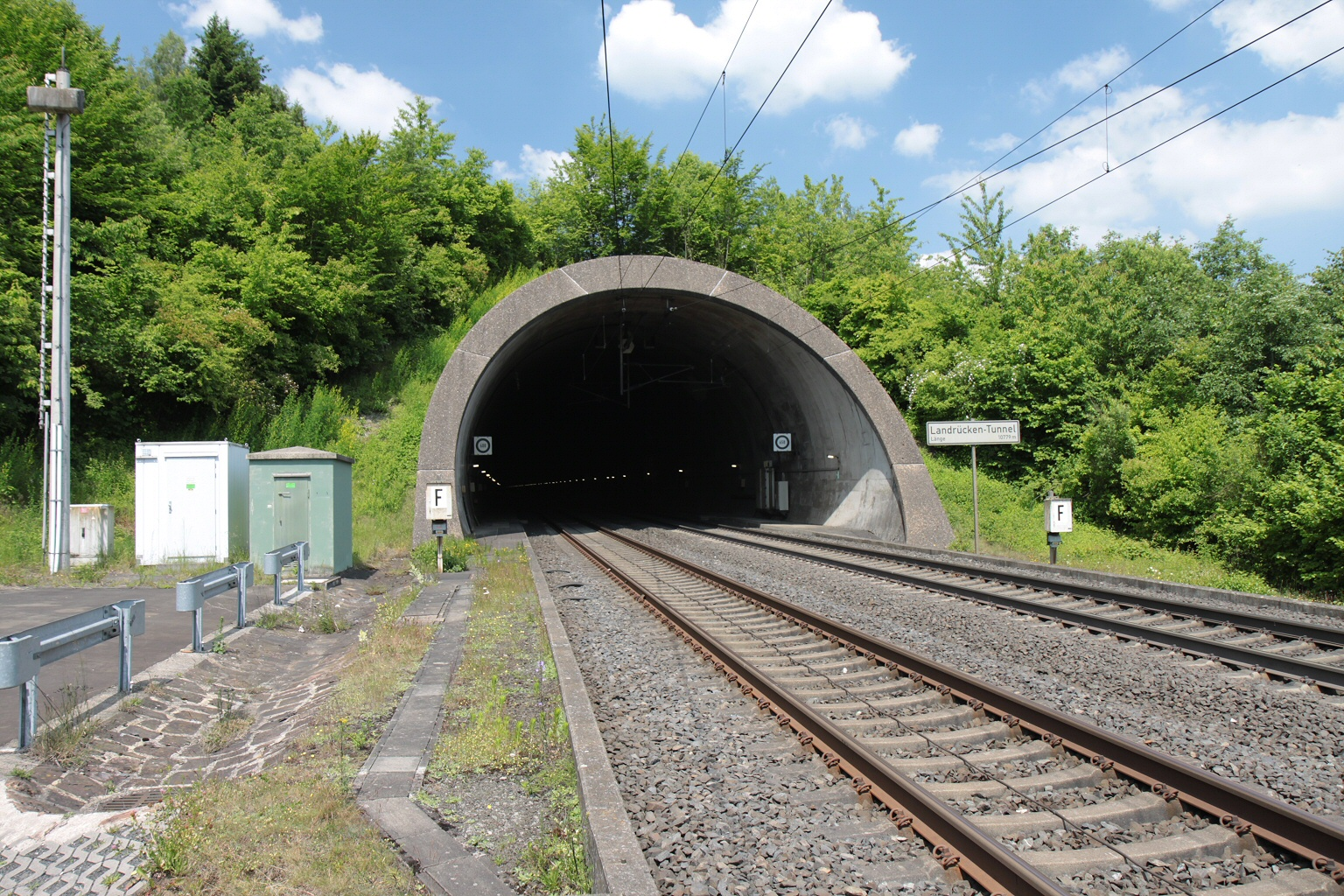 Das Südportal des Landrückentunnels der Schnellfahrstrecke Hannover–Würzburg